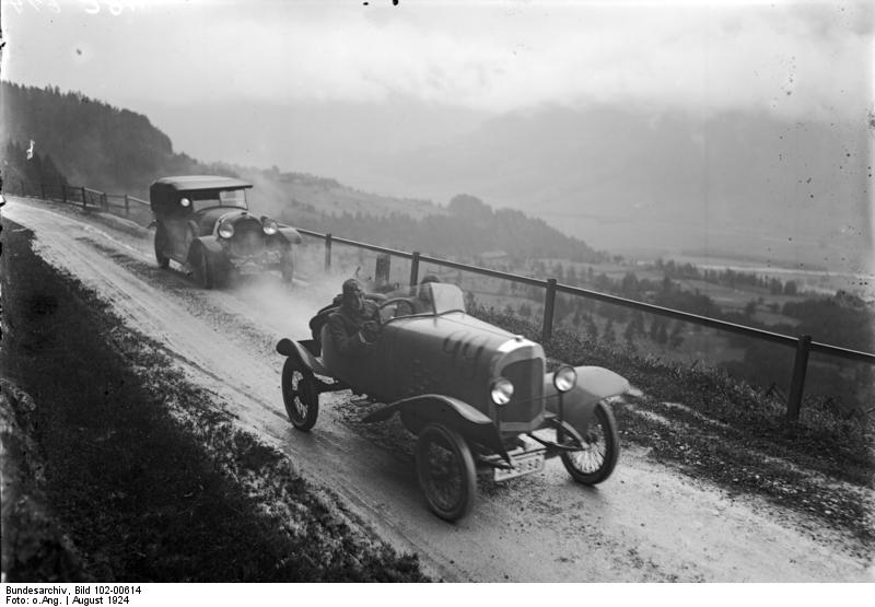 Die Bodensee-Sportwoche des A.D.A.C.! Die Dreiländerfahrt des A.D.A.C. von München durch Tirol und die Schweiz, verbunden mit einer Fahrt rund um den Bodensee fand vom 15. bis 17. August unter großer Beteiligung statt. Prinz zu Leiningen, München, den Hagwagen führend auf der Passstrasse bei Vorarlberg.